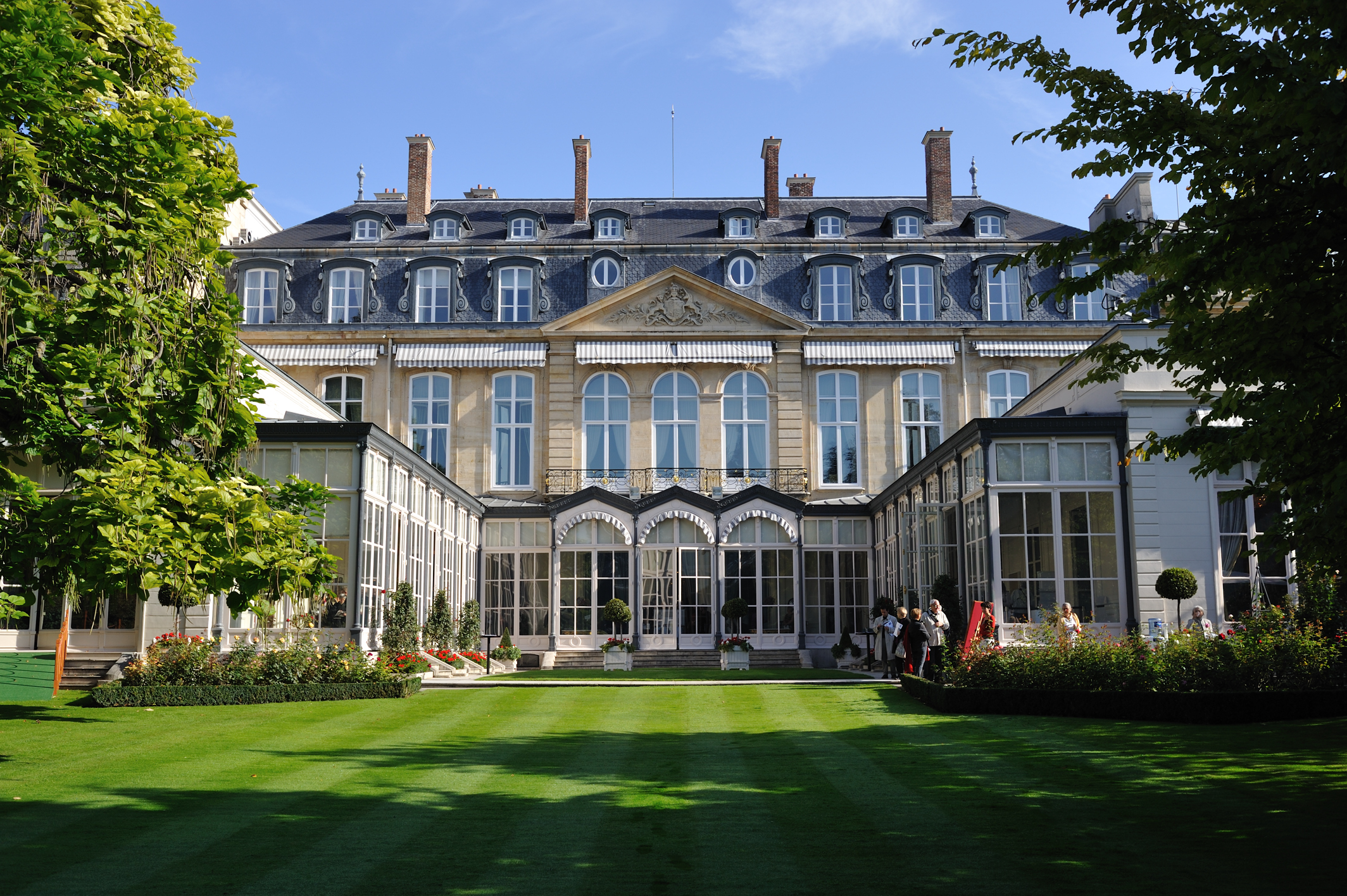 Hôtel de Charost, résidence de l'ambassadeur de Grande-Bretagne, 39 rue du Faubourg Saint-Honoré, Paris, France : vue du jardin Photo prise à l'occasion des journées européennes du patrimoine 2010